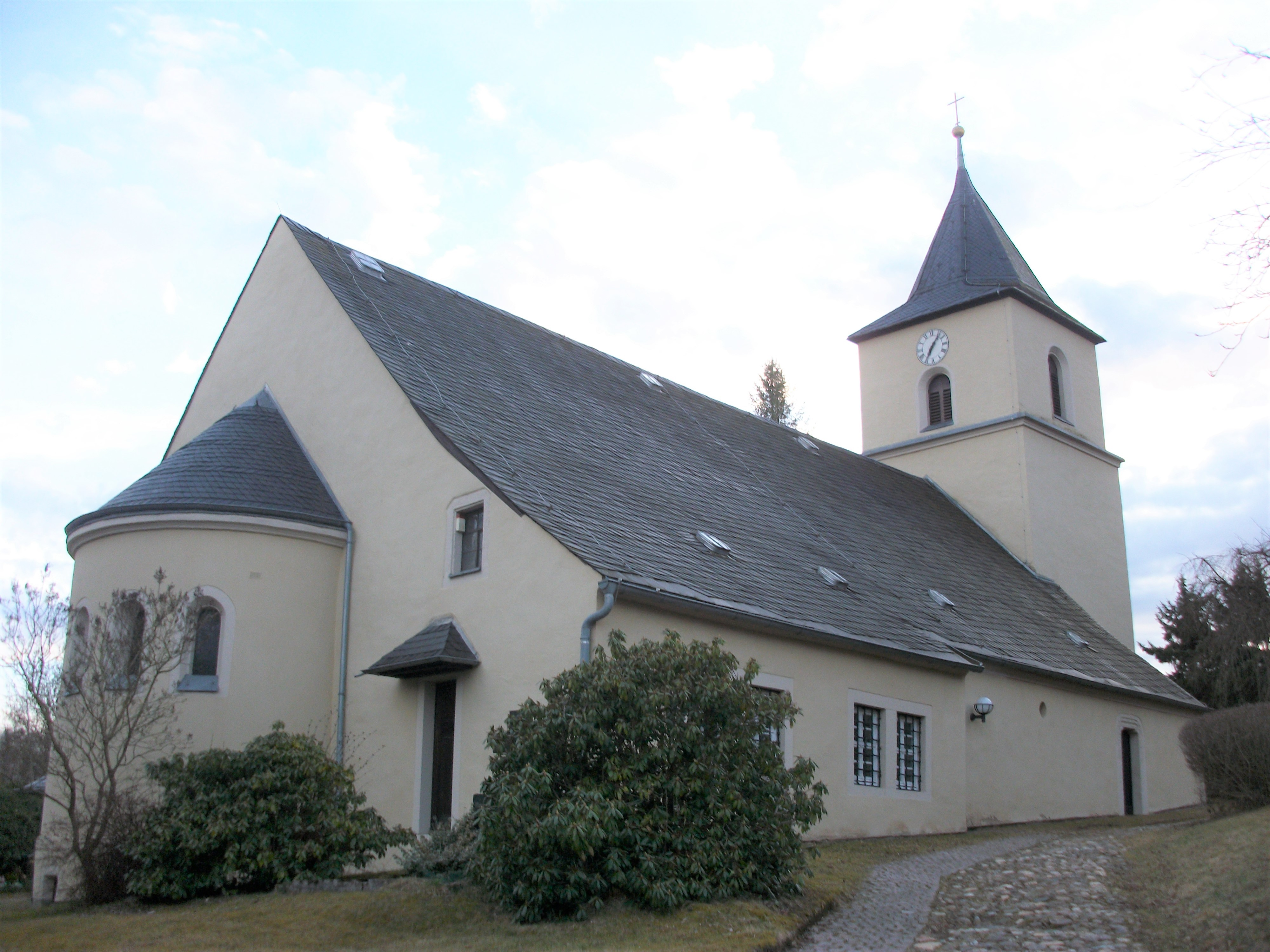 Sachsenburg (Frankenberg), Kirche